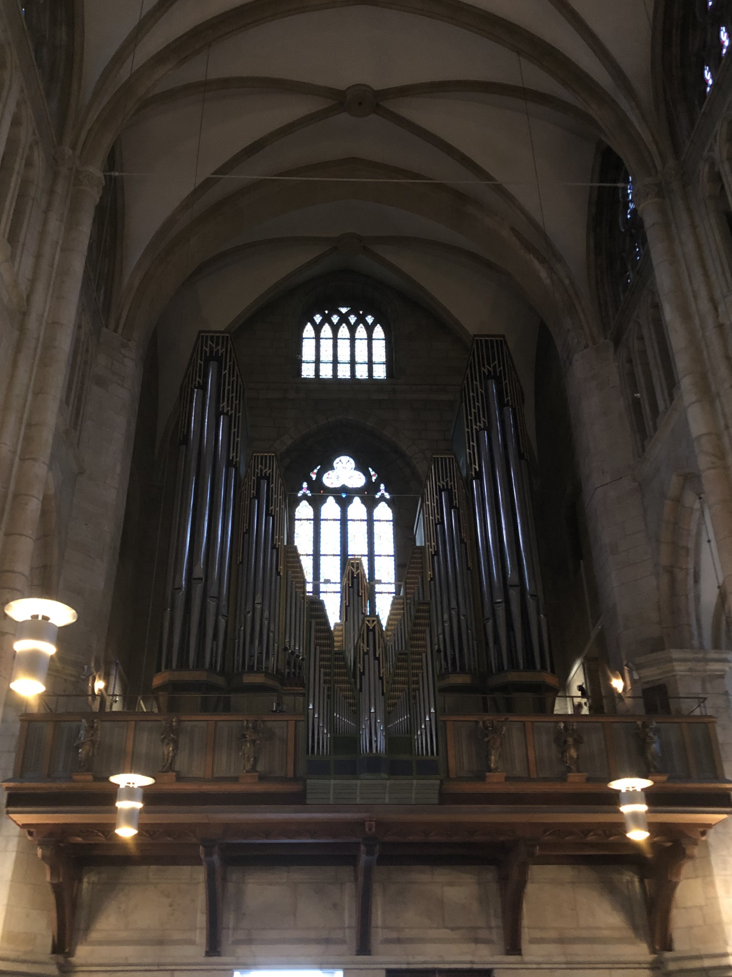 Skara domkyrka kyrkorgel, december 2018